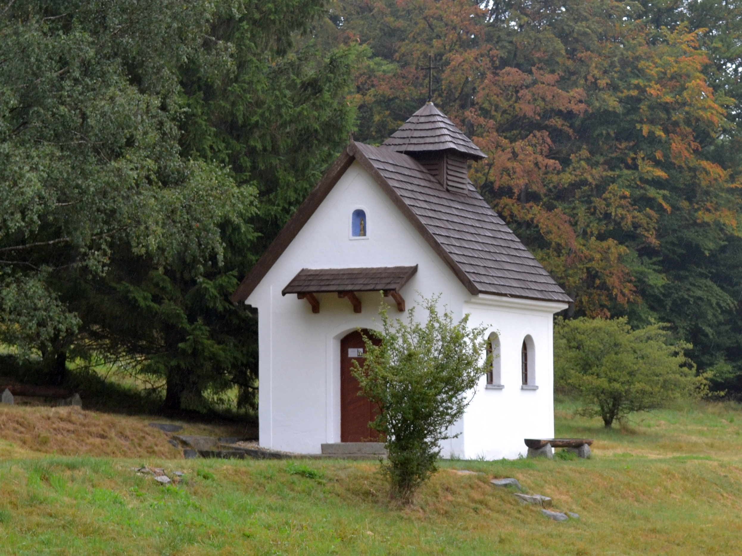 Branišov (Kdyně) - kaple blahoslaveného Karla Rakouského